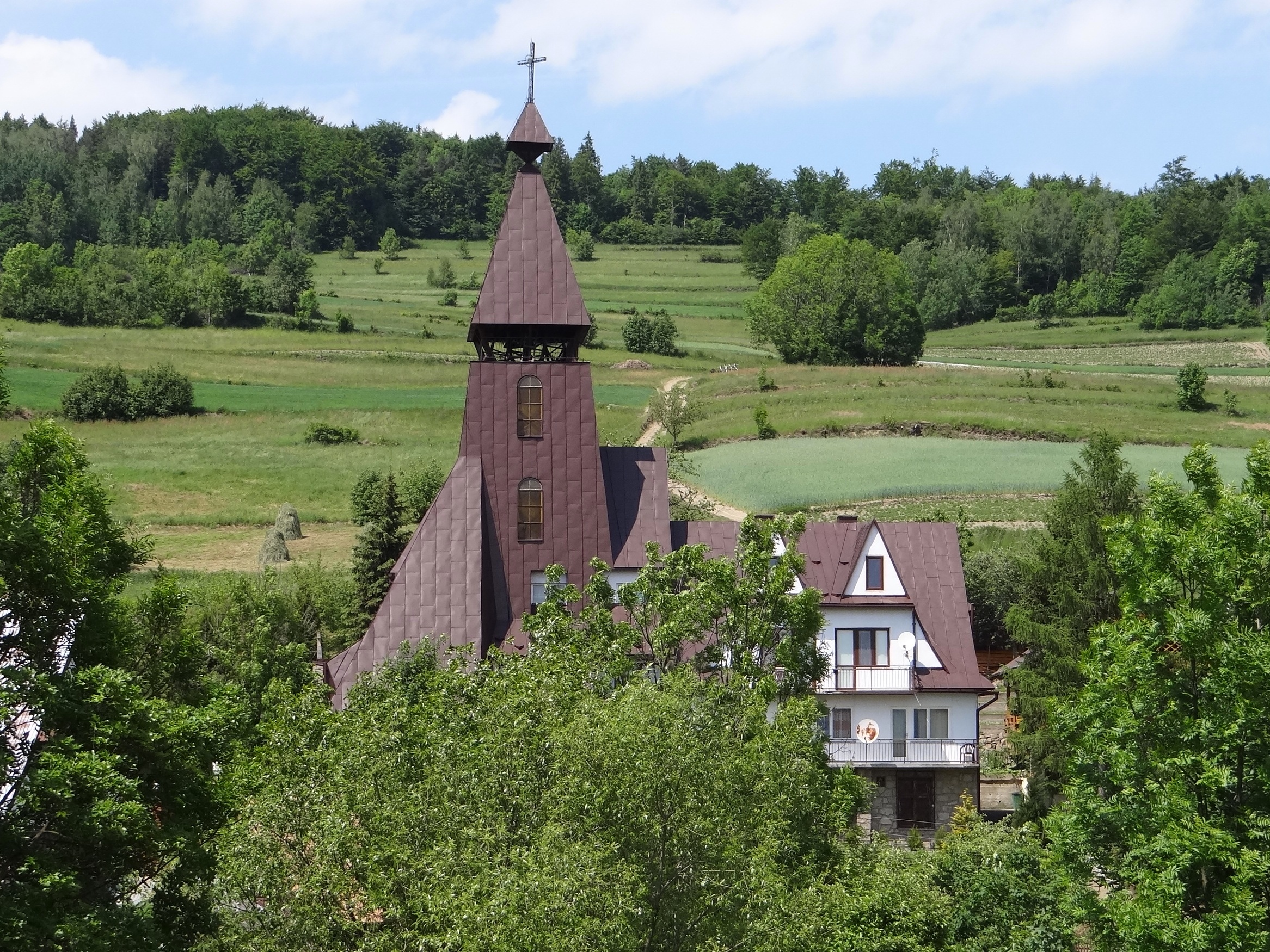 Glisne. Kościół i plebania